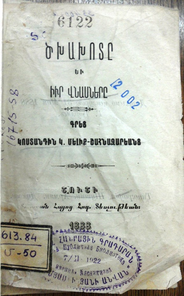 Титульный лист исследования Константина Мелик-Шахназарянца о вреде курения. Брошюра вышла в свет в 1888 году в Шуши